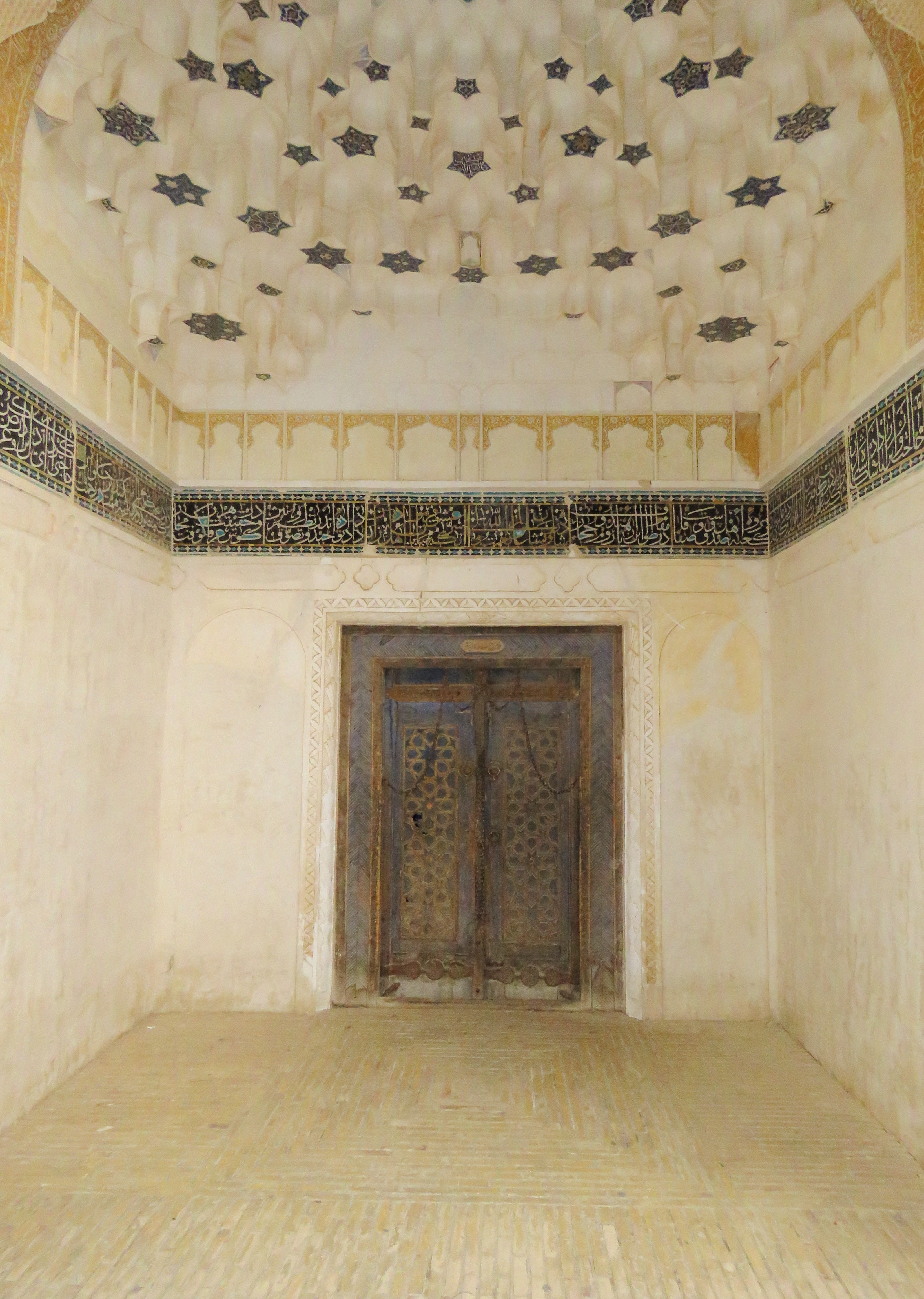 مقبره شاه نعمت الله ولی